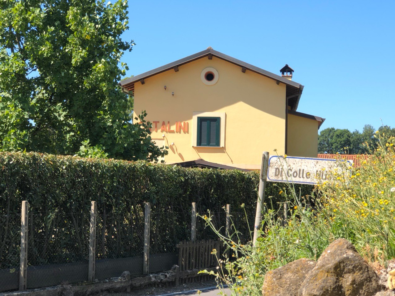 L'ex fermata ferroviaria "Catalini", posta sulla ferrovia Velletri-Terracina e chiusa nel 1957